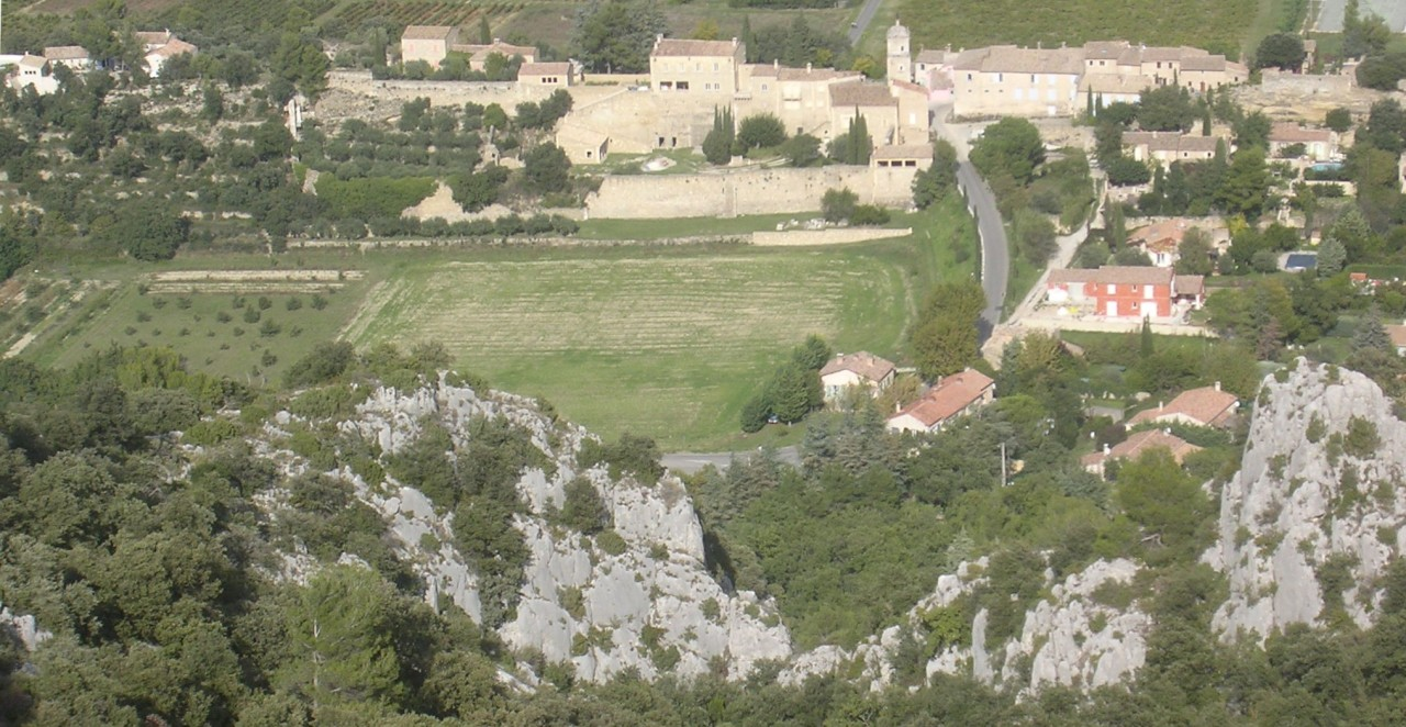 Maubec (Vaucluse, France) vu depuis le rocher de Baude